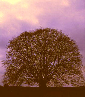 Bavariabuche